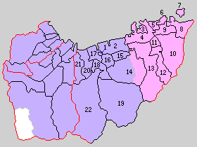 愛媛県新居郡の町村制時点の町村。